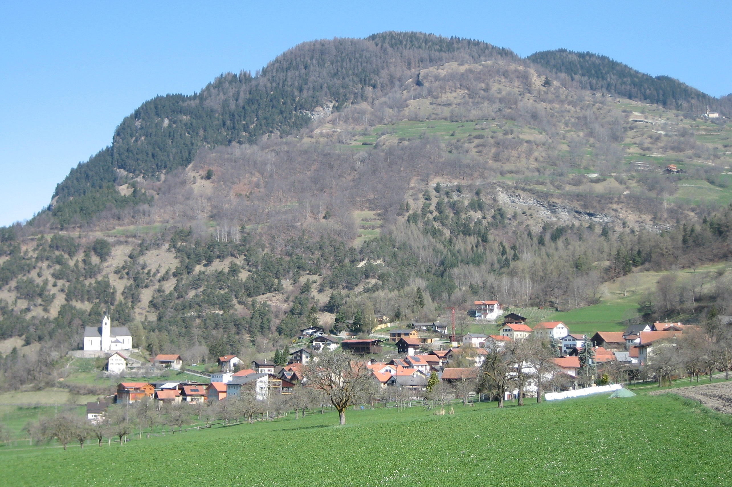 Tumegl/Tomils